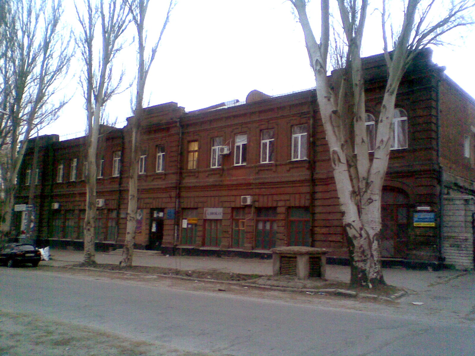 Запорожская специализированная детско-юношеская школа олимпийского резерва по вольной борьбе и дзюдо